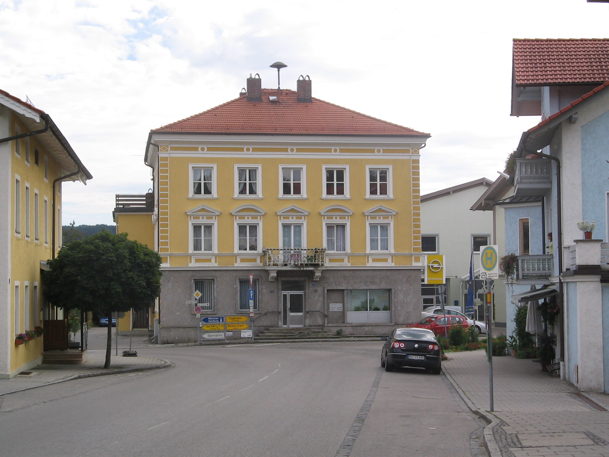 Böhmerhaus in Bruckmühl